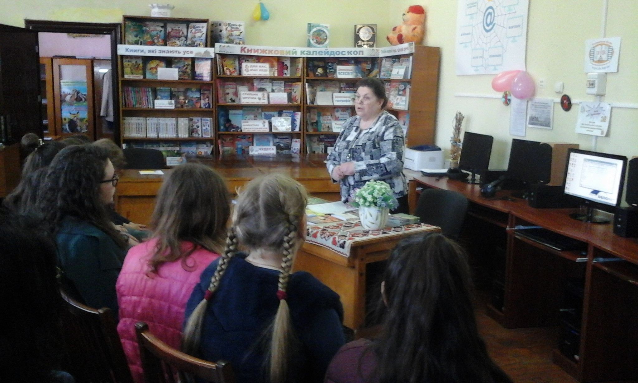 В Бібліотеці-філії №14 відбулася цікава та пізнавальна зустріч з подільською письменицею Галиною Корицькою для учнів НВК №9 7 "В" класу.